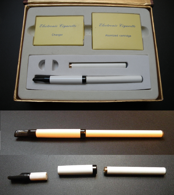 cigarette electronique